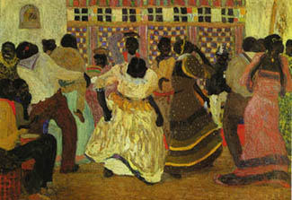 Cuadro de Pedro Figari; Candombe, Oil on Canvas, 1921